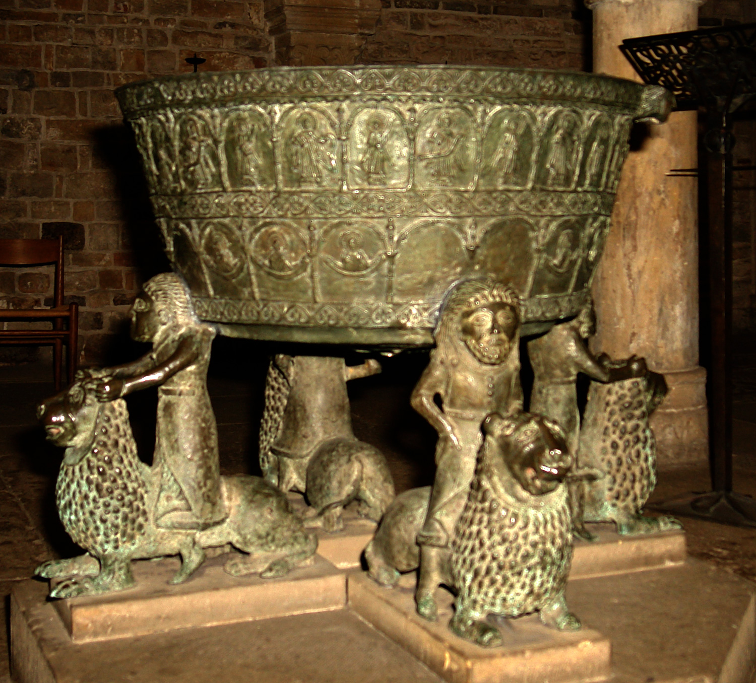 Bremer St. Petri Dom: Taufbecken (um 1220) in der Westkrypta. Ein Meisterwerk spätromanischer Bronzegießkunst, das zu den prächtigsten und ältesten dieser Art zählt. Die Bedeutung der vier auf Löwen reitenden Figuren ist nicht geklärt. In den oberen Rundbögen sind 26 Figuren dargestellt, in den unteren 12 Halbfiguren. (Qu.: Der Dom zu Bremen, ISBN 3-7845-4231-X)